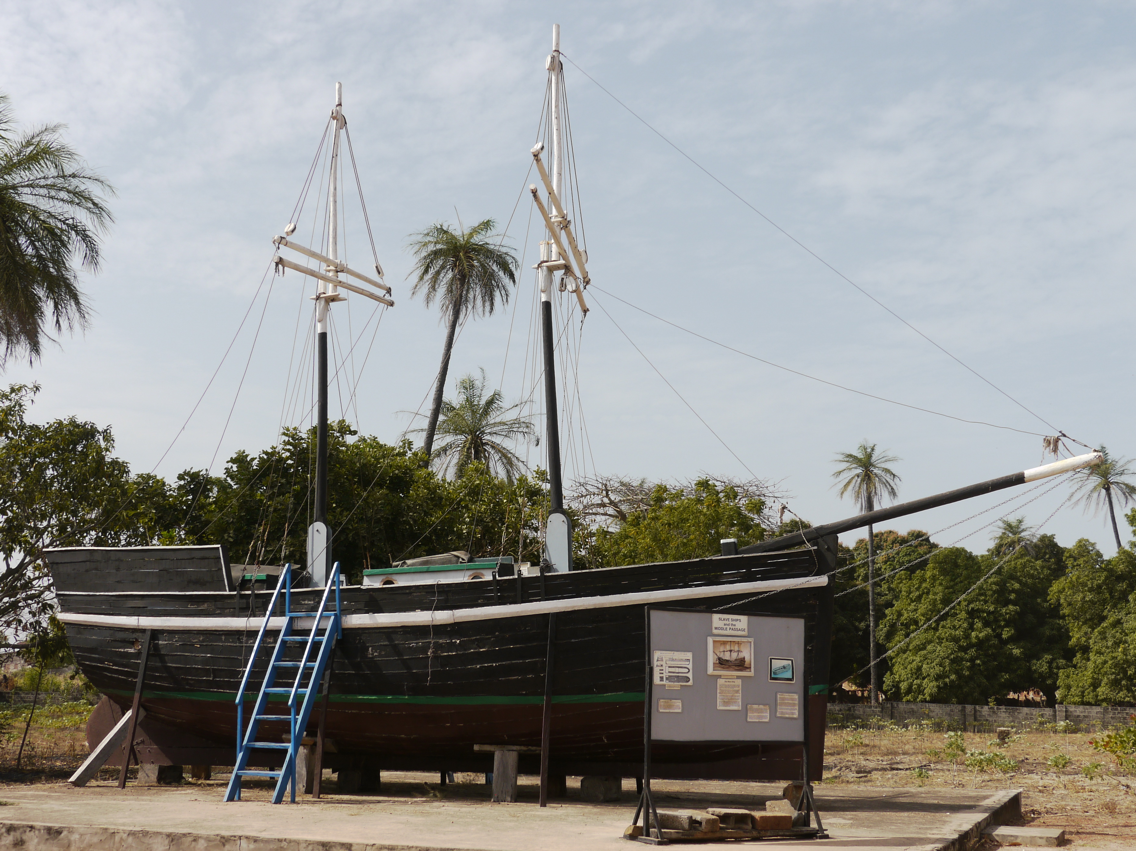 GambiaRoots010